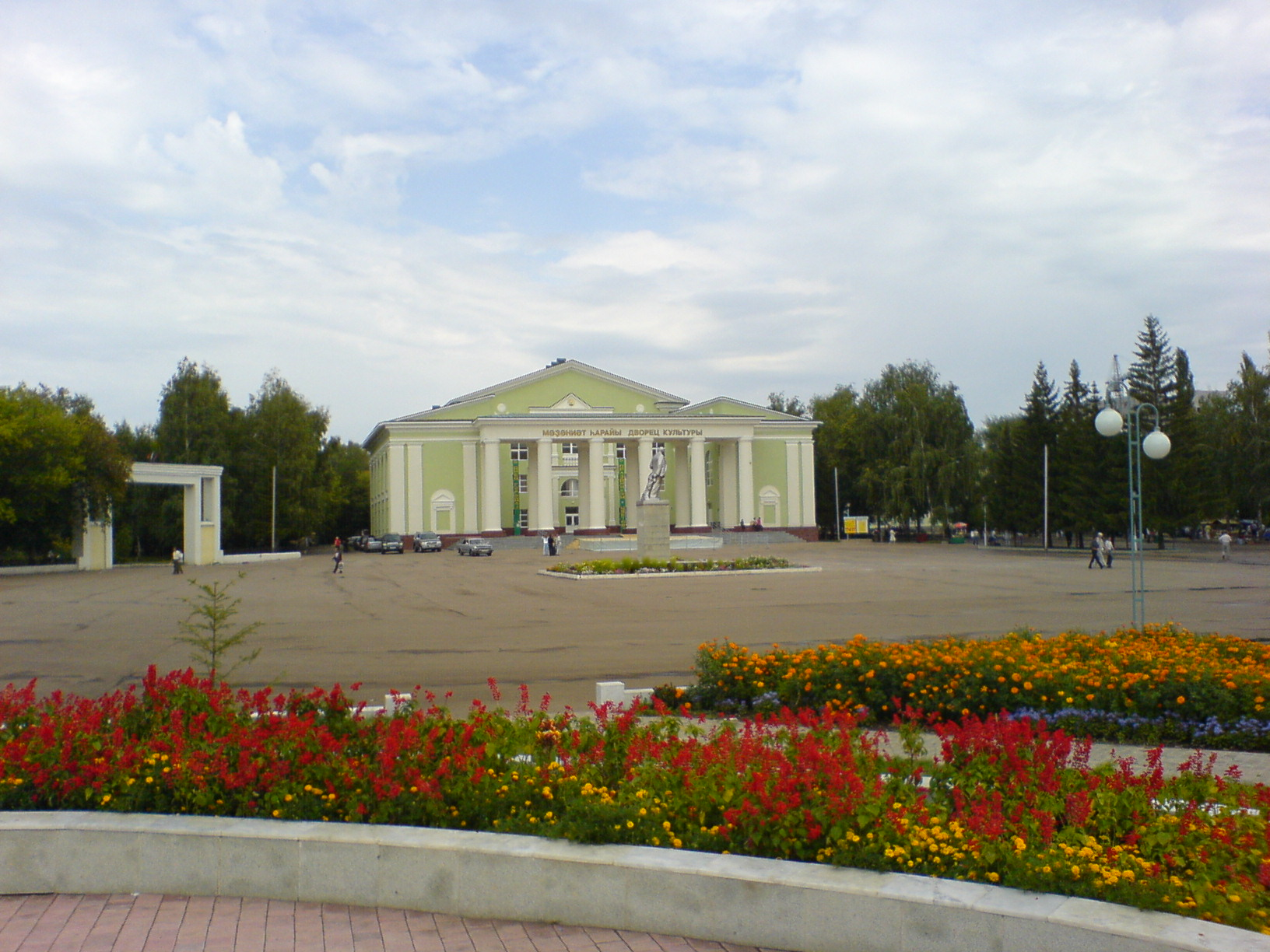 Дворец культуры (вид с площади Ленина)